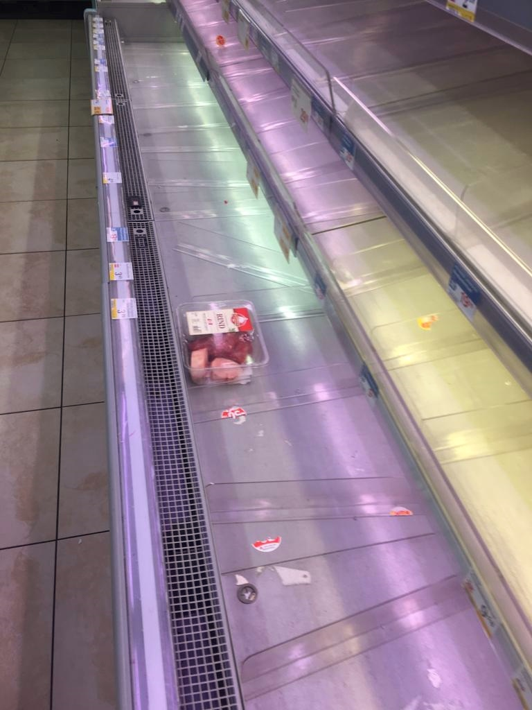 Supermarkt in Wien-Leopodstadt, Auswirkung Hamsterkäufe auf Grund von Covid 19